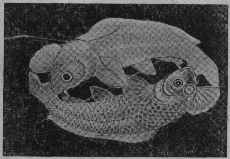 《廢藝齋集稿》殘卷《南鷂北鳶考工志》中的雙鯉風箏圖示